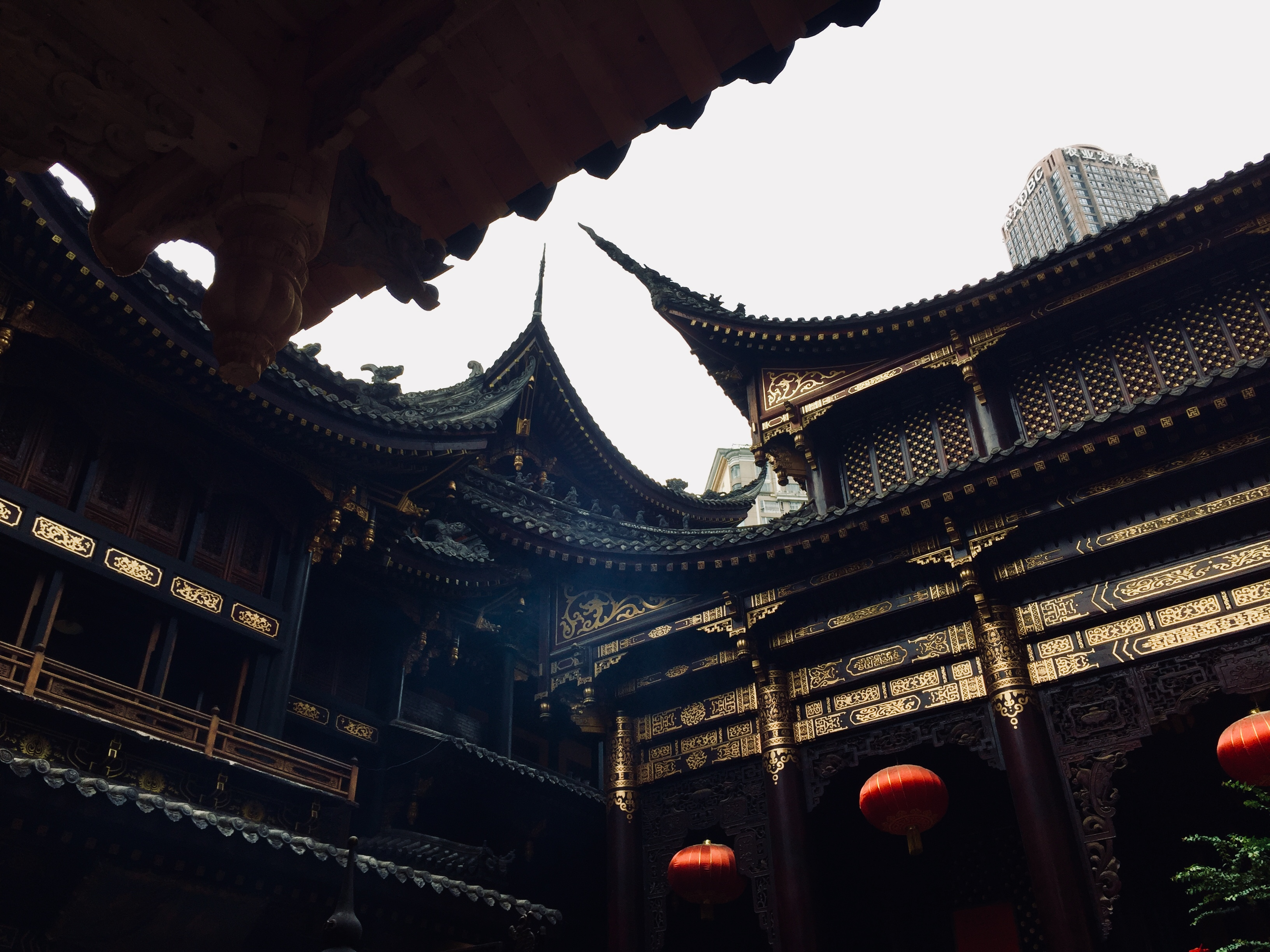 中文（中国大陆）: 重庆罗汉寺内景